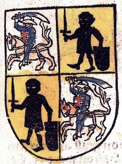 Беларуская (тарашкевіца): Герб Вітаўта Вялікага (Vitaŭt Vialiki) Пагоня (Pahonia) з кронікі Ульрыха Рыхэнталя